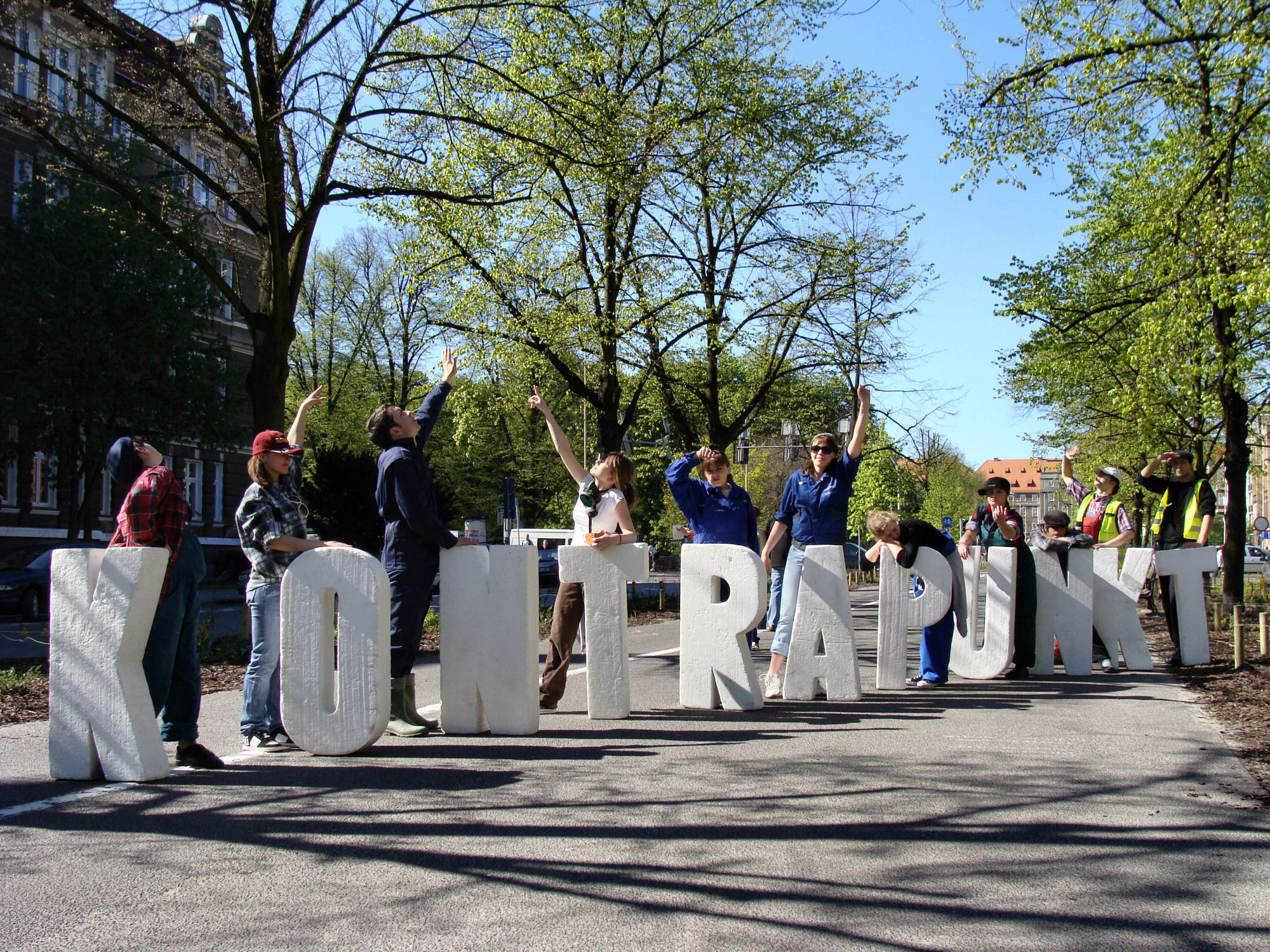 Akcja promocyjna Ogólnopolskiego Przeglądu Teatrów Małych Form "KONTRAPUNKT" w Szczecinie